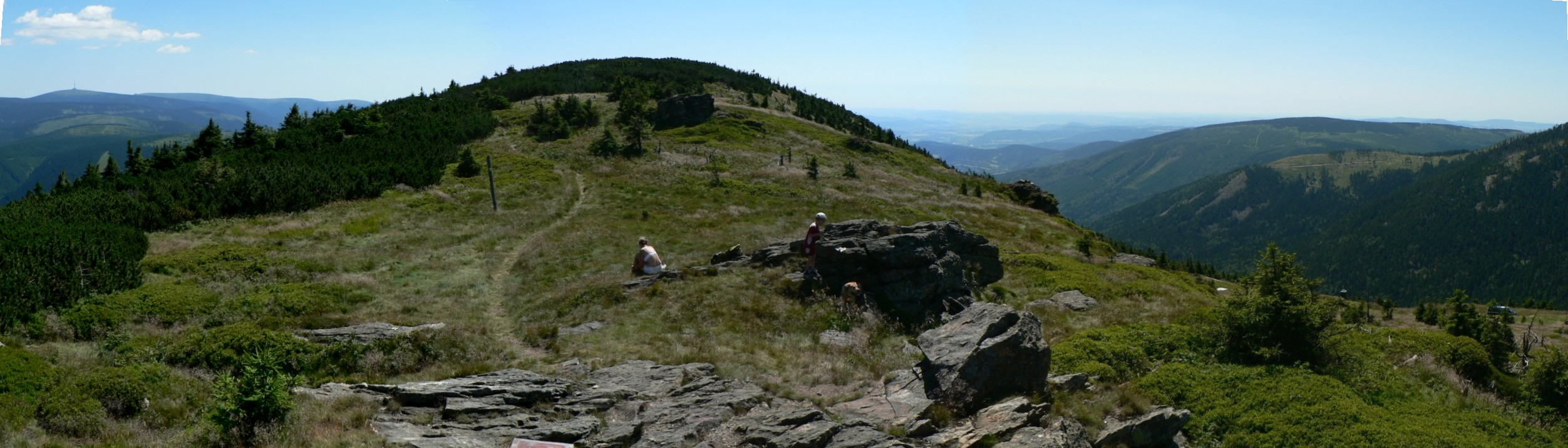 Vrchol Červené hory, Hrubý Jeseník.